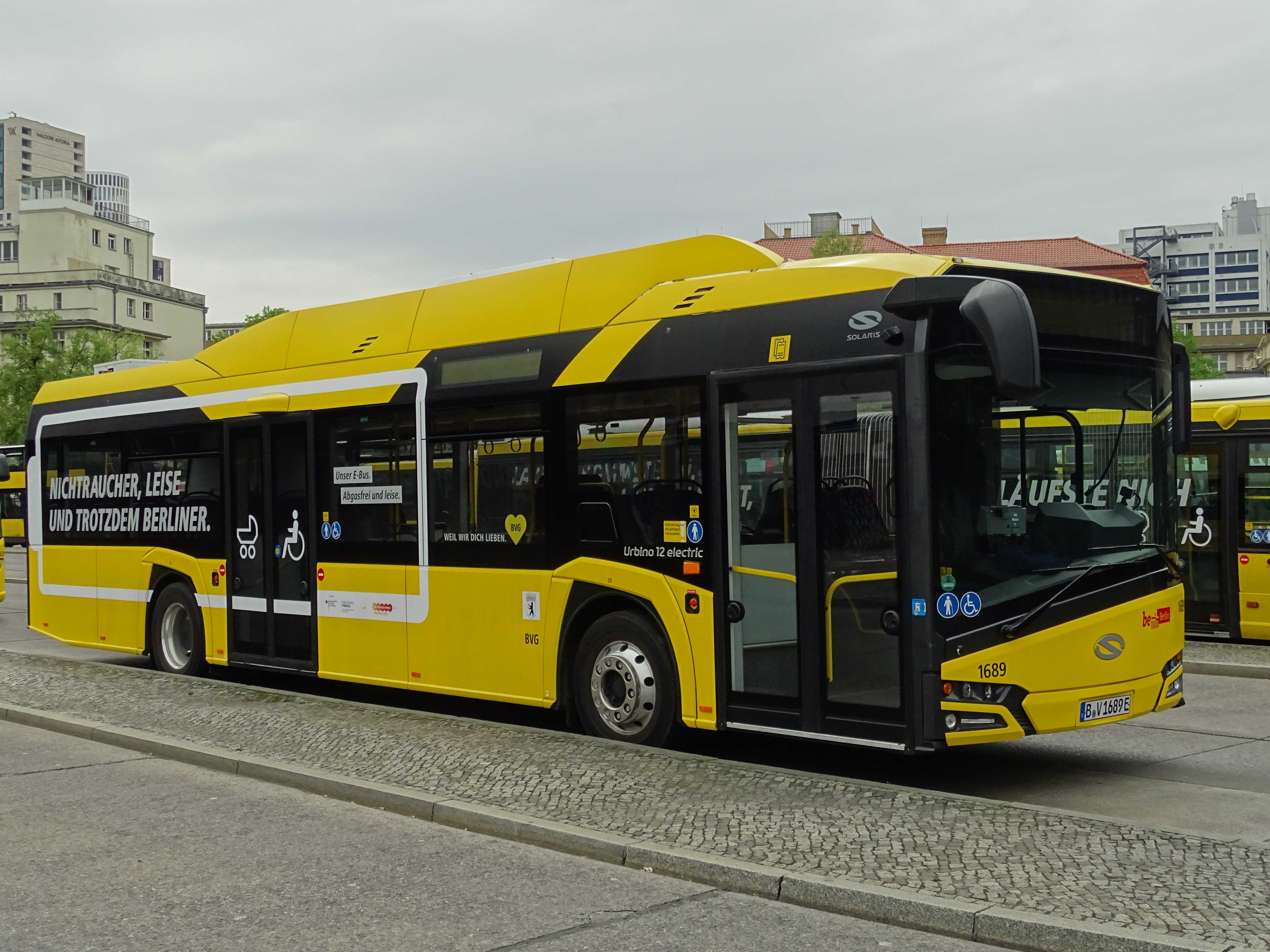 BVG Solaris Urbino 12 electric Newurbino 04.2018 Berlin Hertzallee